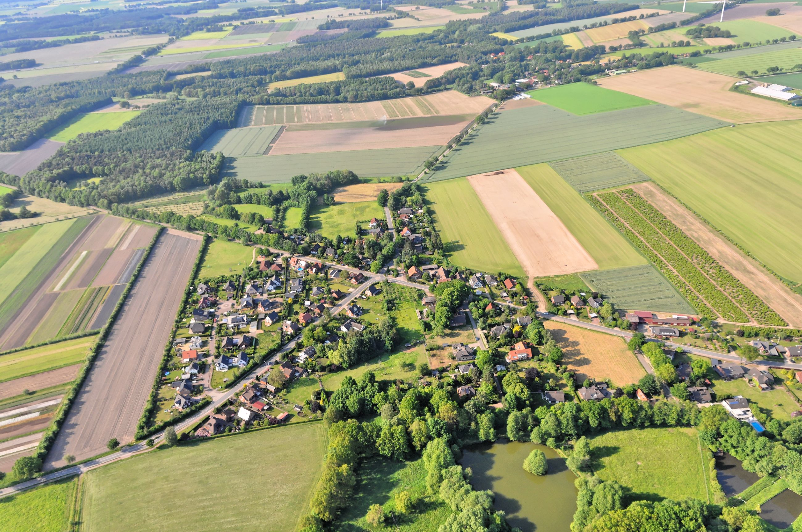 Überführungsflug vom Flugplatz Nordholz-Spieka über Lüneburg, Potsdam zum Flugplatz Schwarzheide-Schipkau